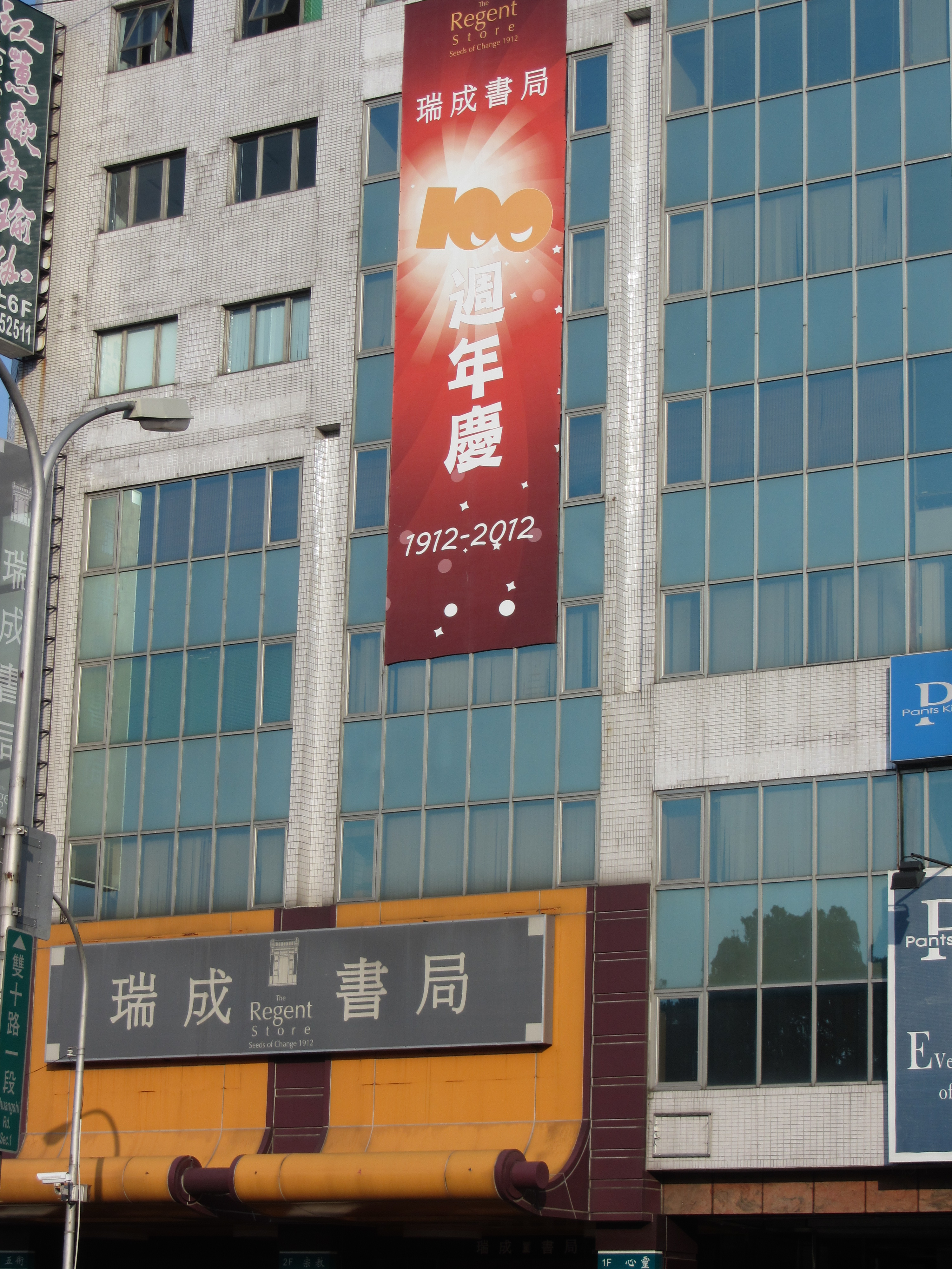 中文（台灣）: 瑞成書局台中總店。